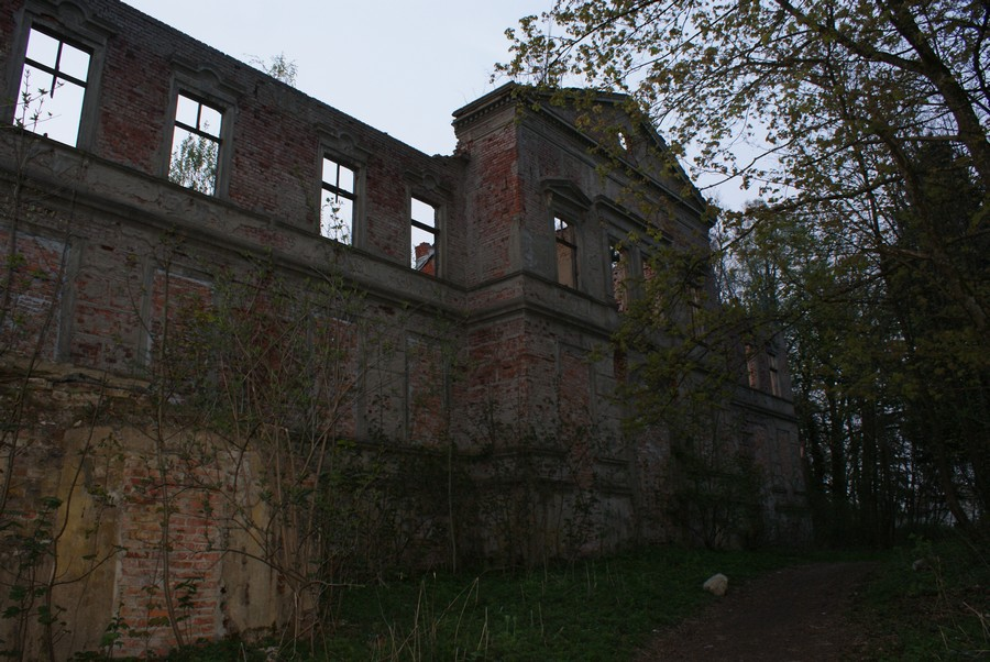 Ruiny pałacu w Nosibądach 03.1977.